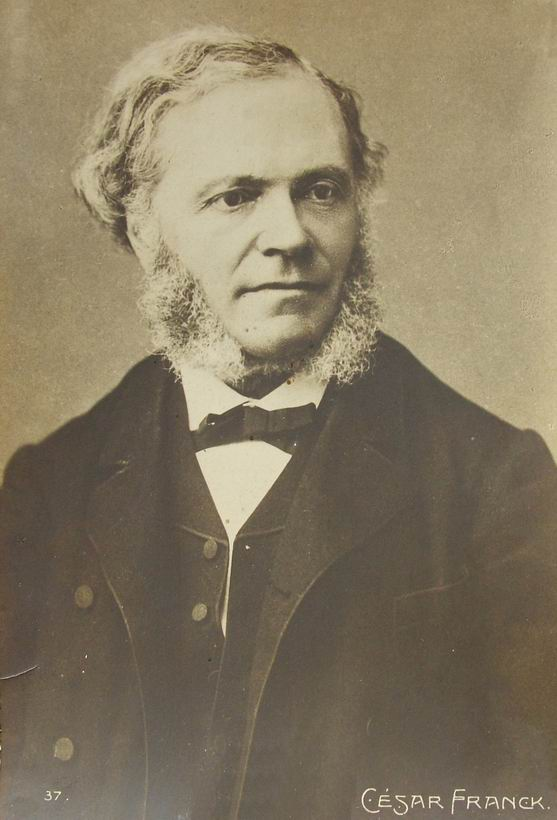 композитор и органист Цезарь Франк, фотокарточка 1910-х годов